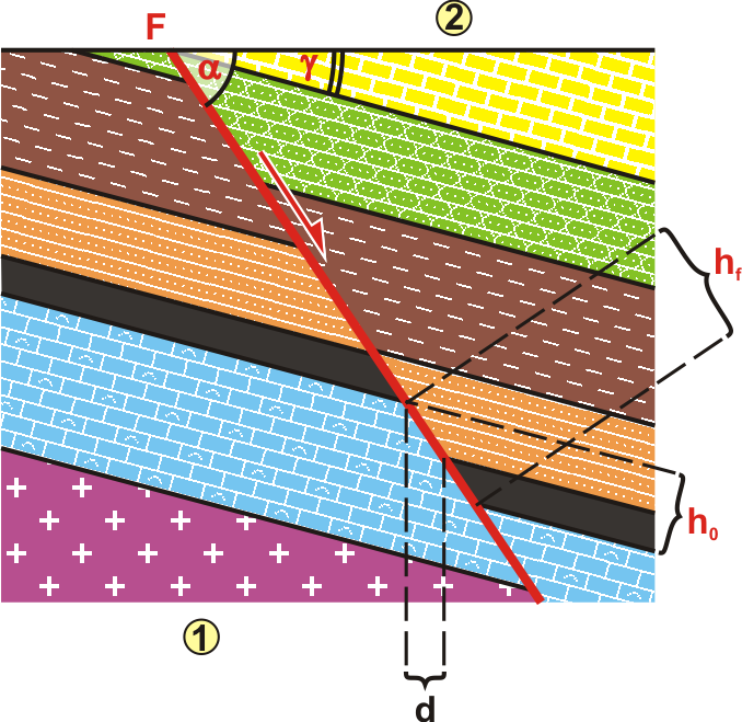 Скид згідний і його структурні елементи: 1 - лежаче крило, 2 - висяче крило, F - площина зміщувача, h0 - істинна амплітуда скиду, hf - амплітуда по зміщувачу, альфа - кут падіння зміщувача, гамма - кут падіння пластів, d - зіяння пласта